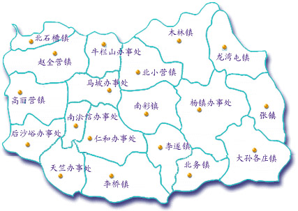 北京市順義區行政區劃圖。